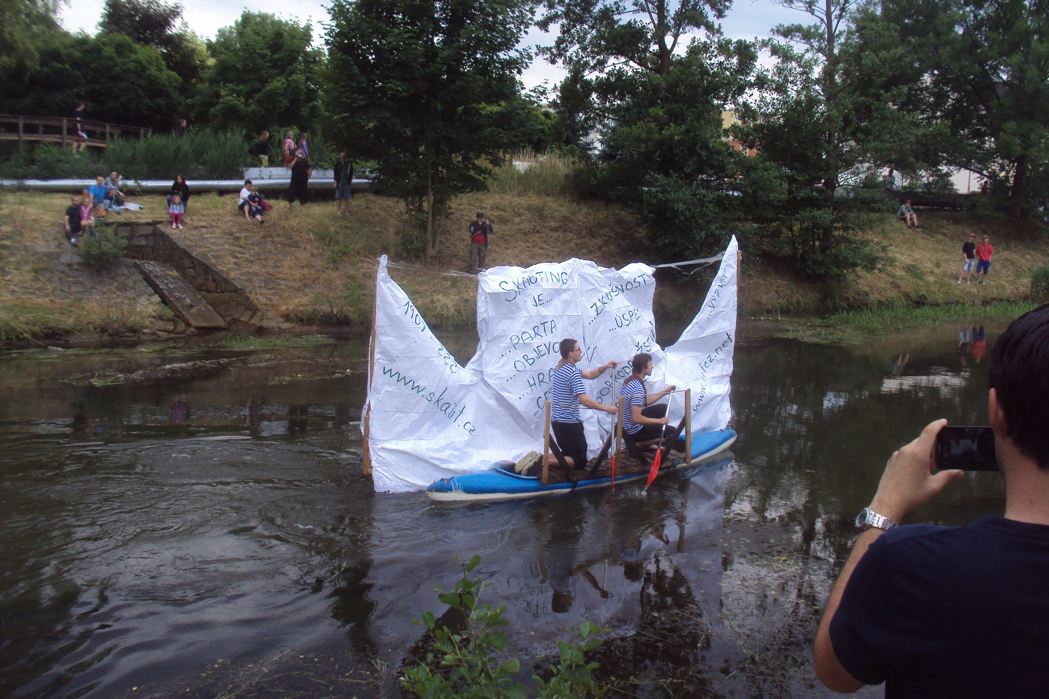 Plavidlo v akci